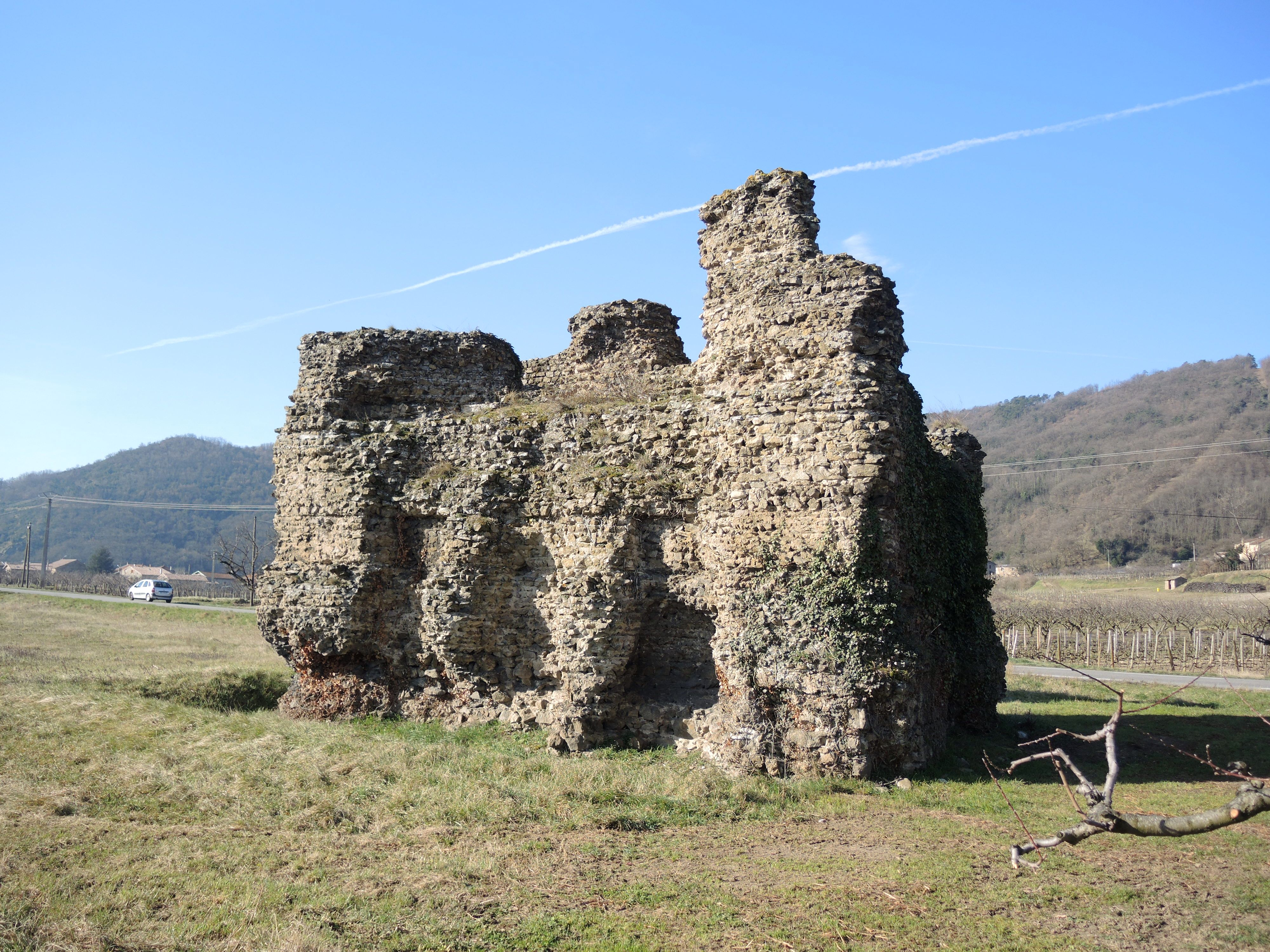 Andance vue générale et détails